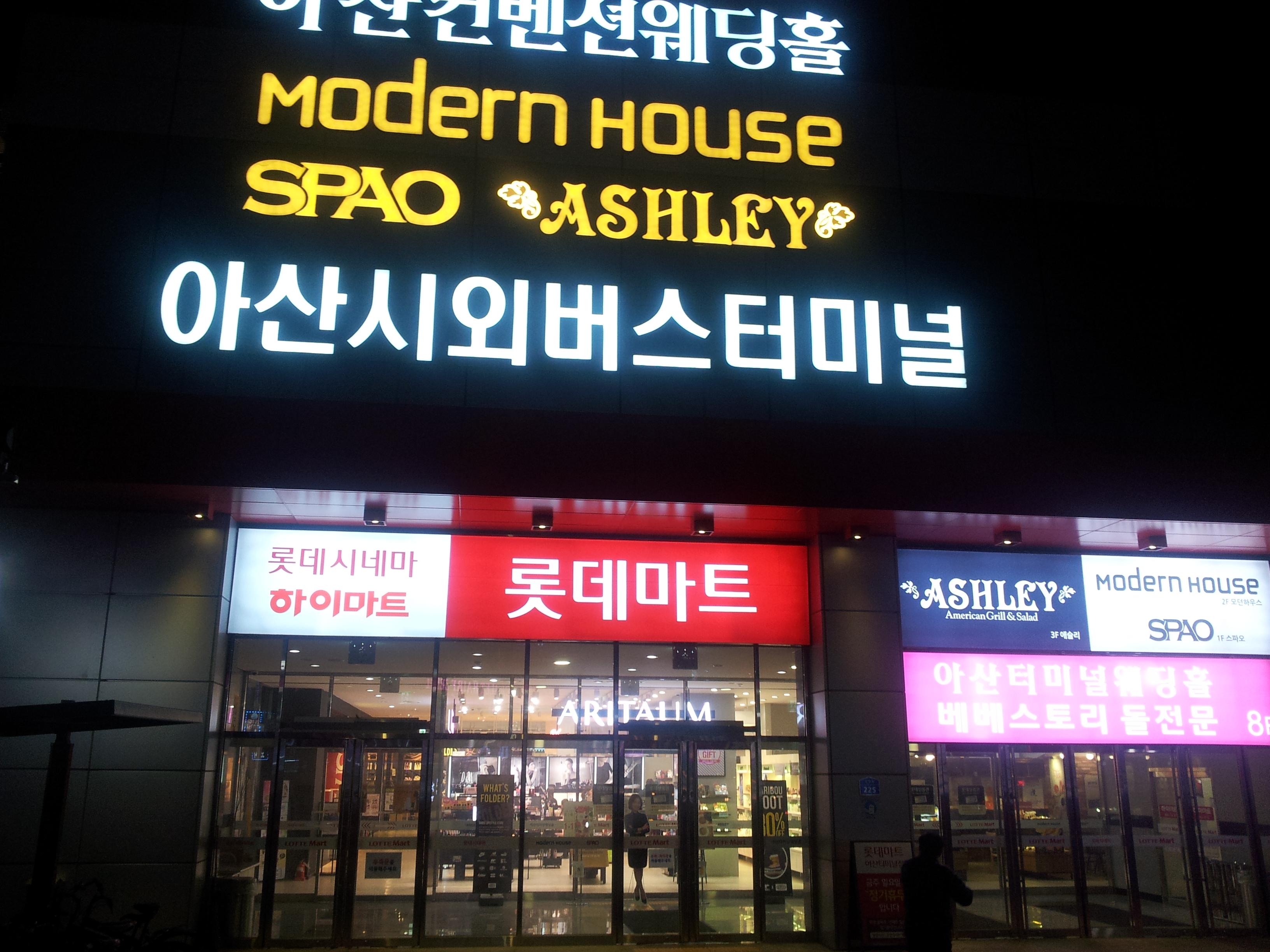 아산시외버스터미널 모습